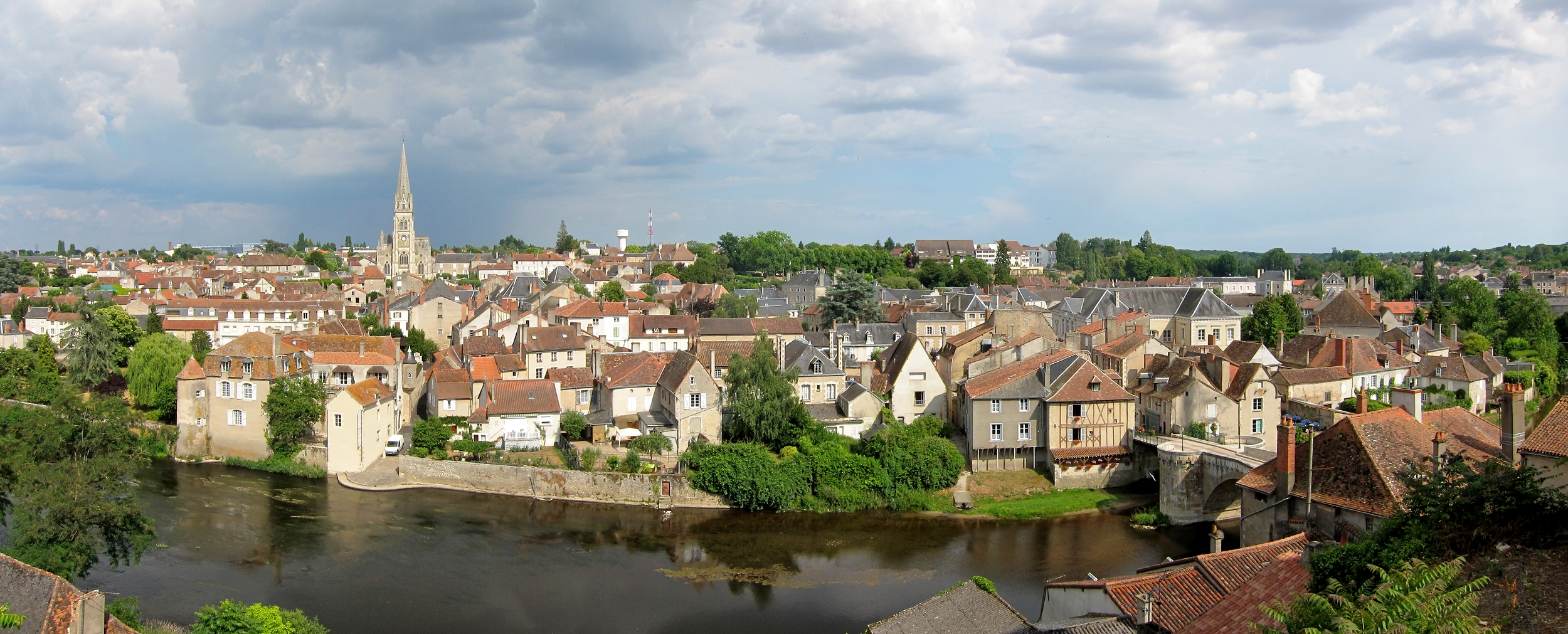 Vue sur Montmorillon (Vienne) depuis la rive gauche de la Gartempe.